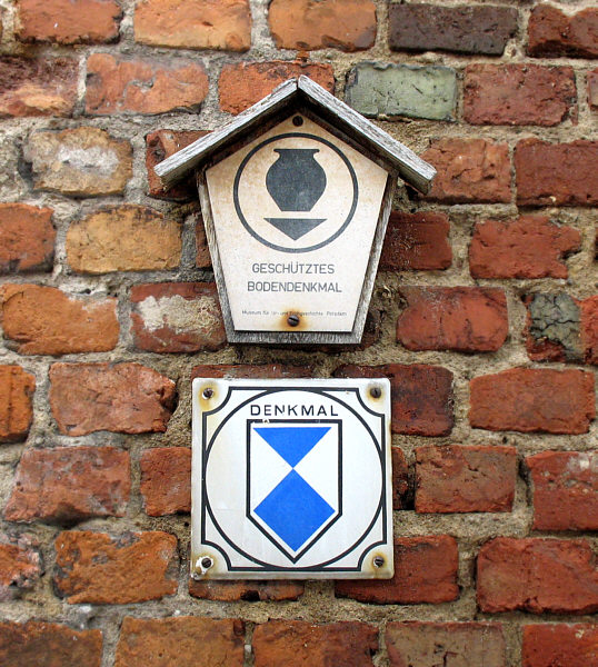 Geschütztes Bodendenkmal, Festung Bärenkasten, Oderberg in Brandenburg